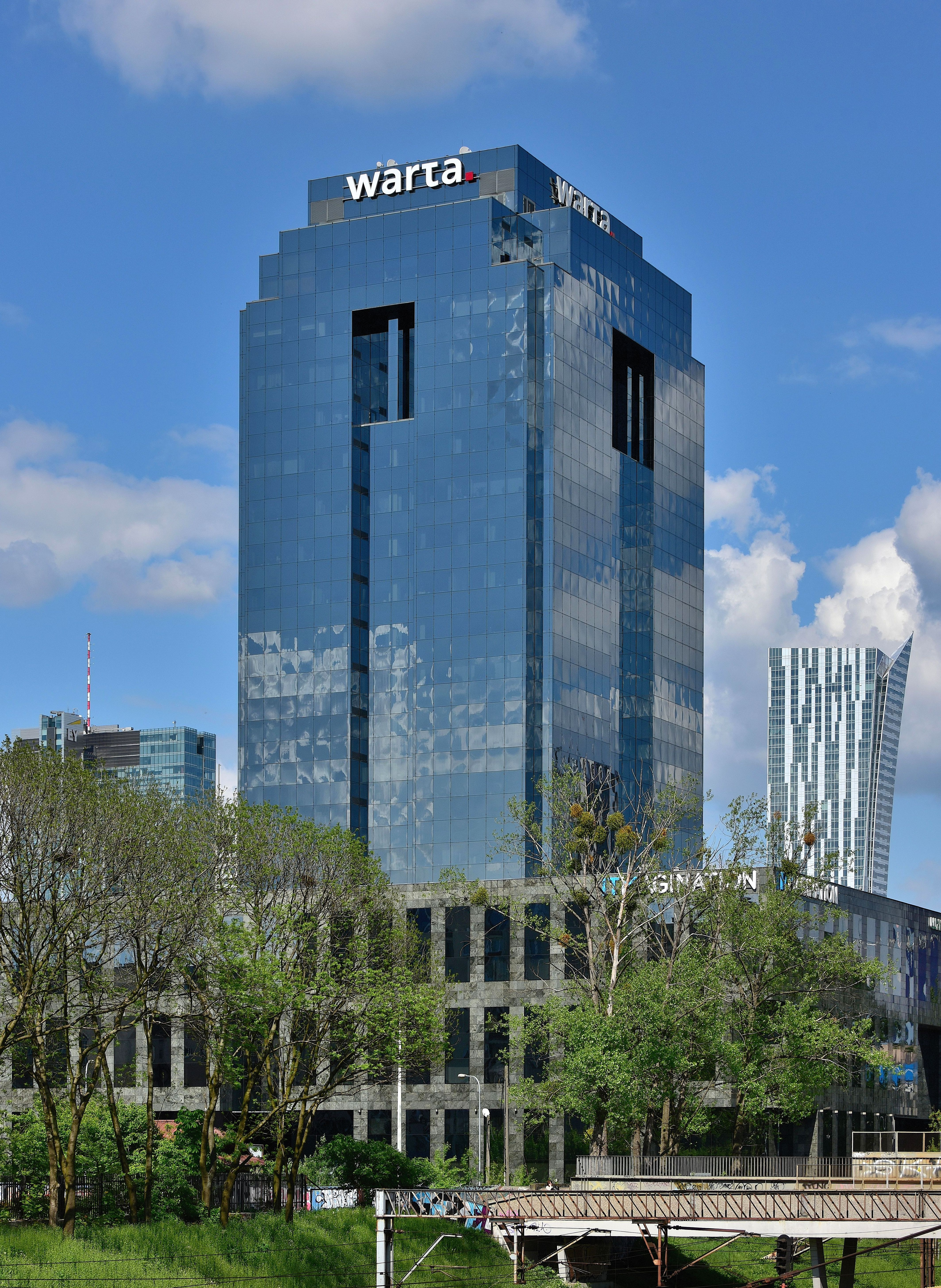 Biurowiec Warta Tower w Warszawie